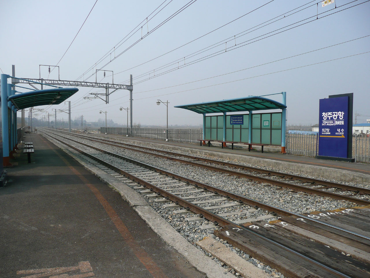 清州空港駅ホーム